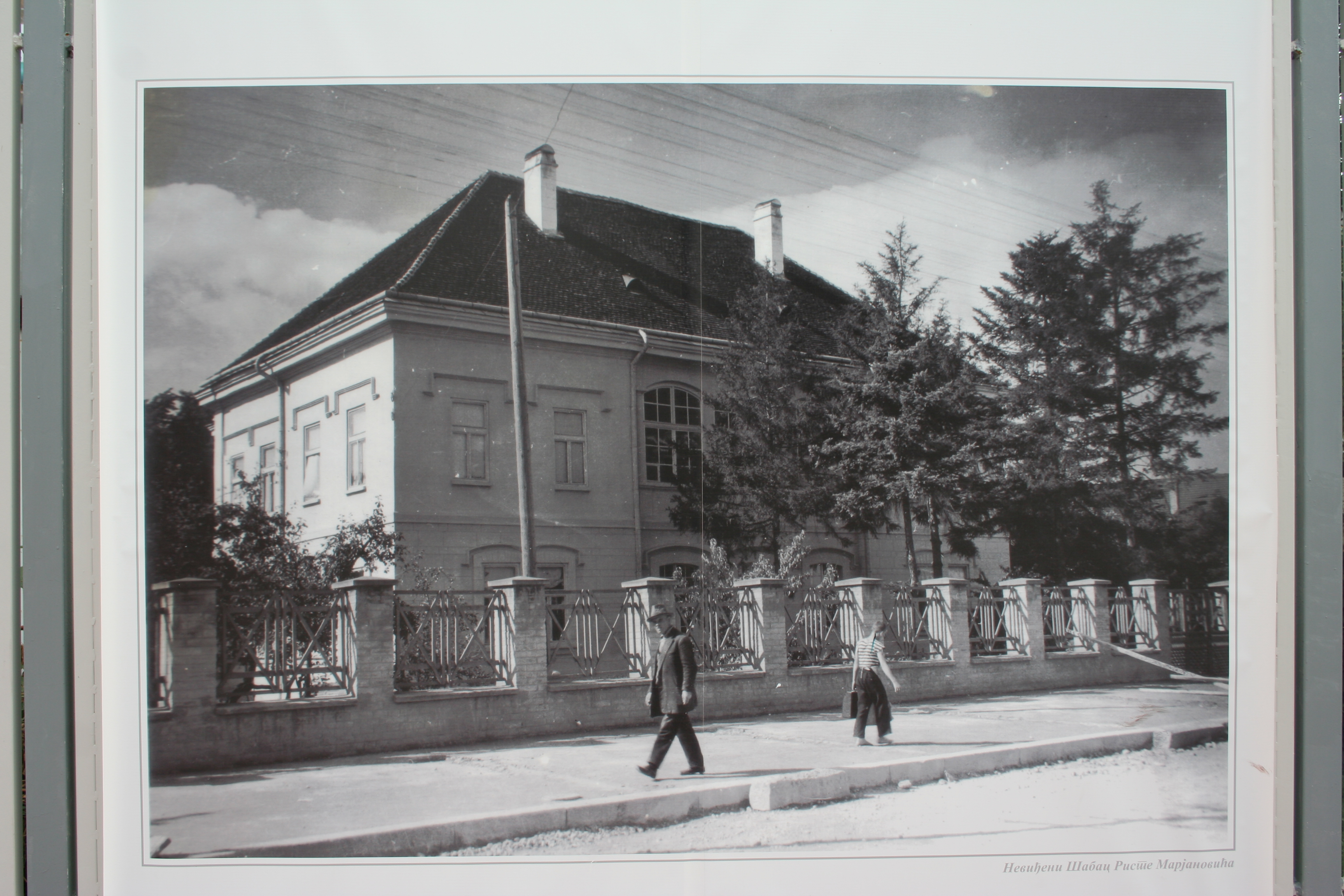 Izložba slika starog Šapca, autora Riste Marjanovića na otvorenom